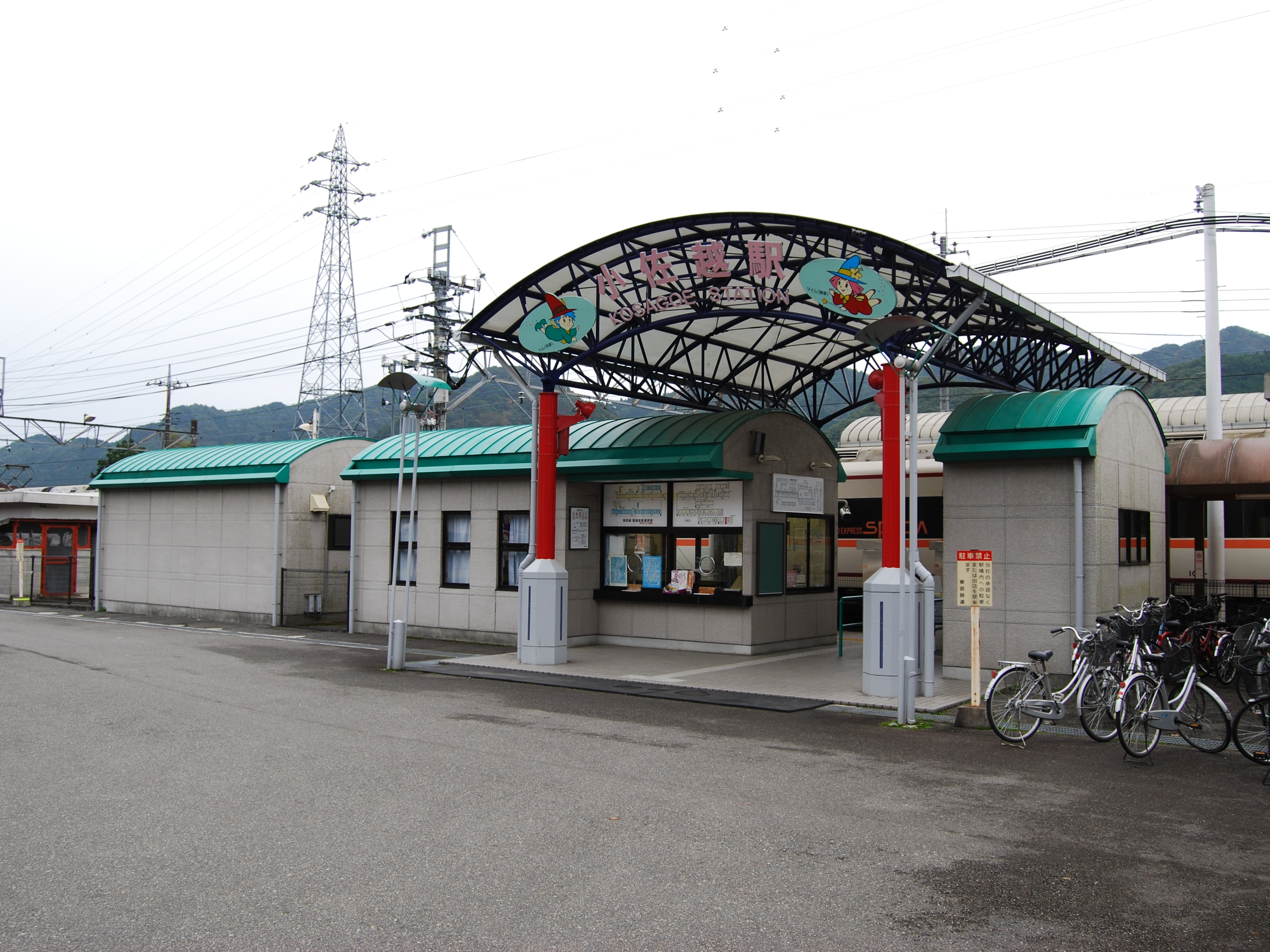 東武鉄道鬼怒川線小佐越駅駅舎全景（2008/10/26撮影）